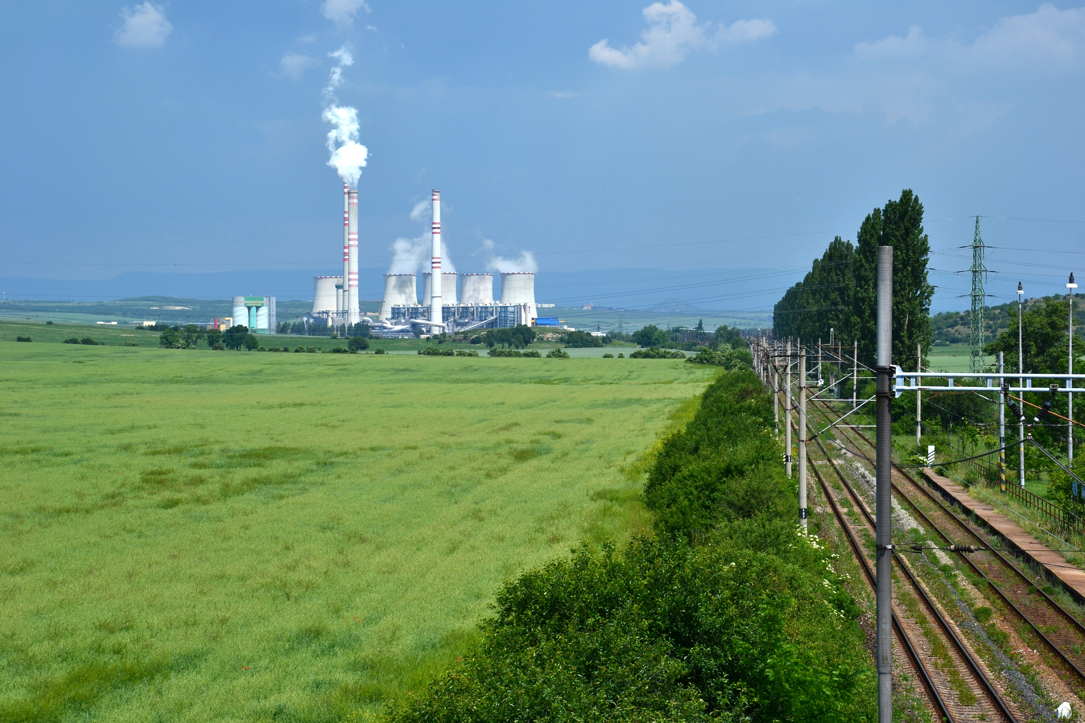 Elektrárna Počerady z Výškova